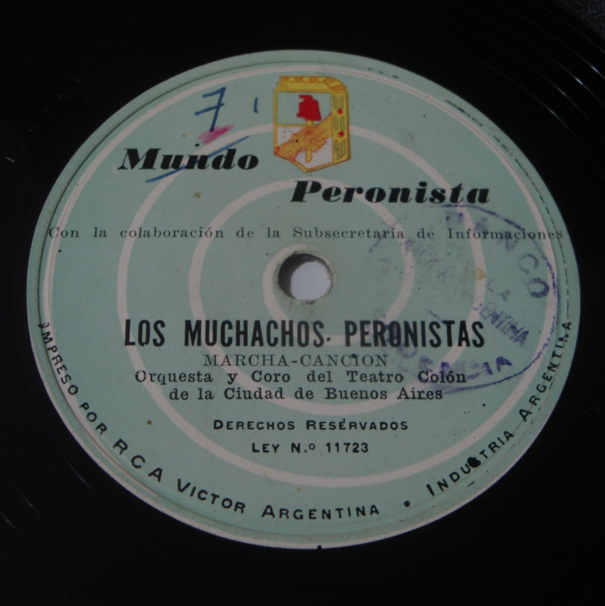 Disco de pasta editado en 1955 con los temas "Los Muchachos Peronistas" y "Evita Capitana".